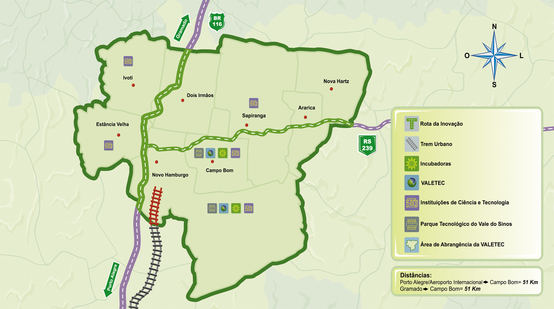 Mapa da RI